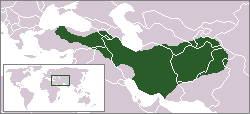 Median Empire ca. 600 BCE.